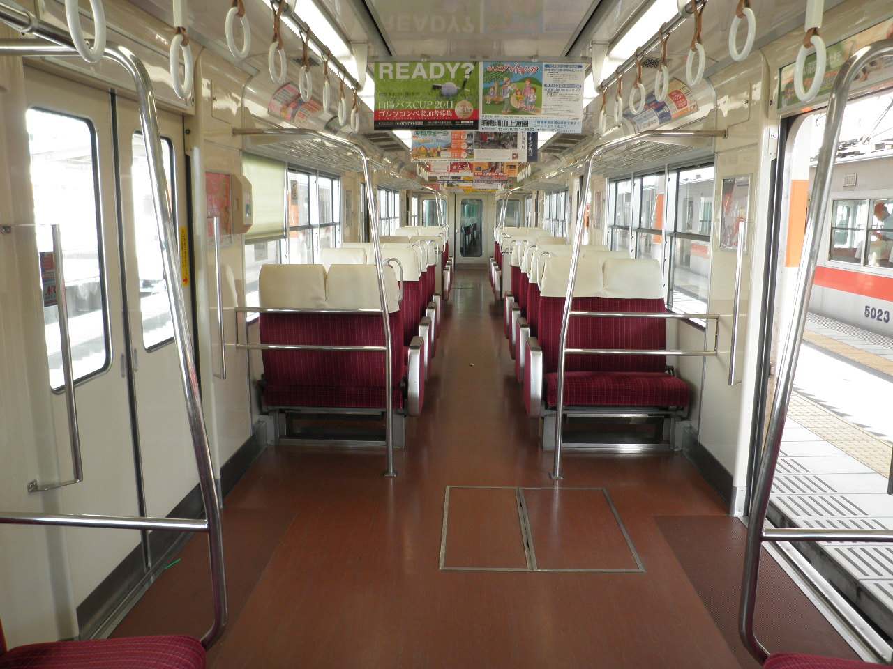 2011年9月 山陽姫路駅にて撮影